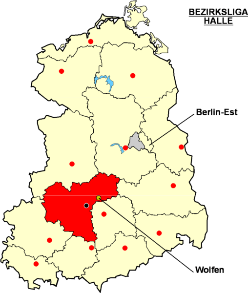 Localisation de Wolfen dans la "Bezriksliga Halle" Catégorie:Logo de clubs de football - Allemagne